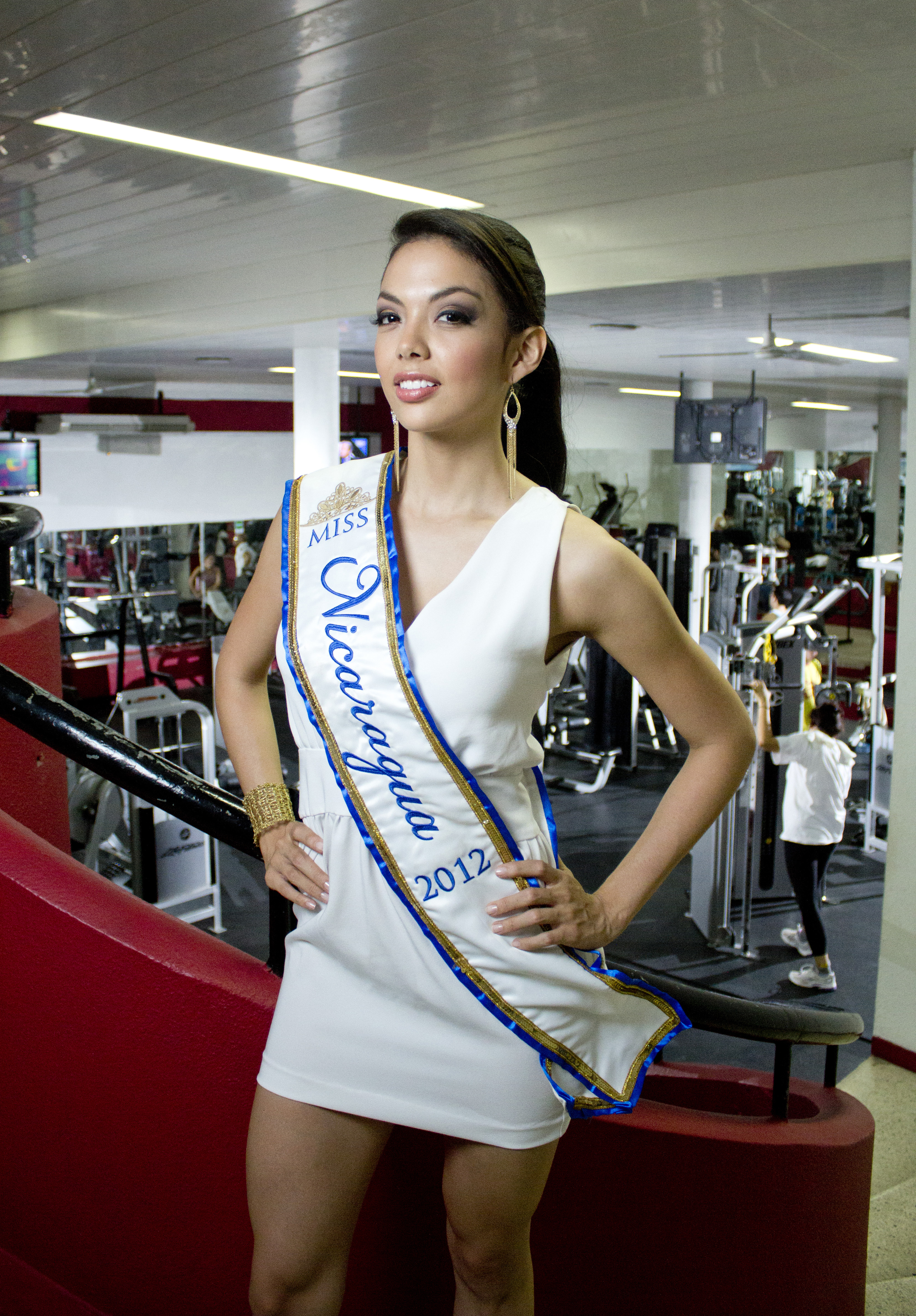 Farah Eslaquit Miss Nicaragua 2012. Sesión para revista Fitness & Nutrition. Gimnasio Bally. Marzo 2012